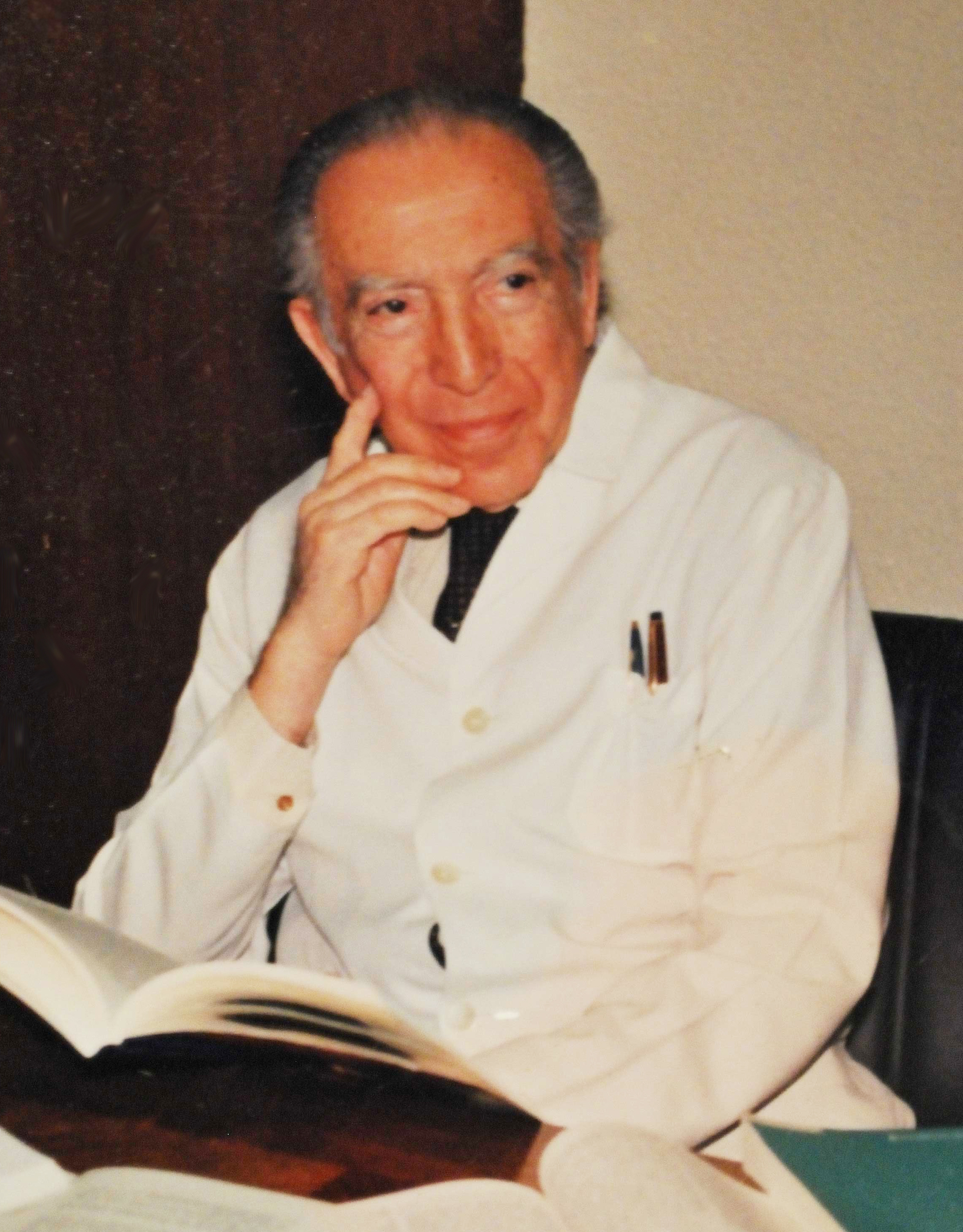 Retrato del profesor Dr. Armando Roa Rebolledo